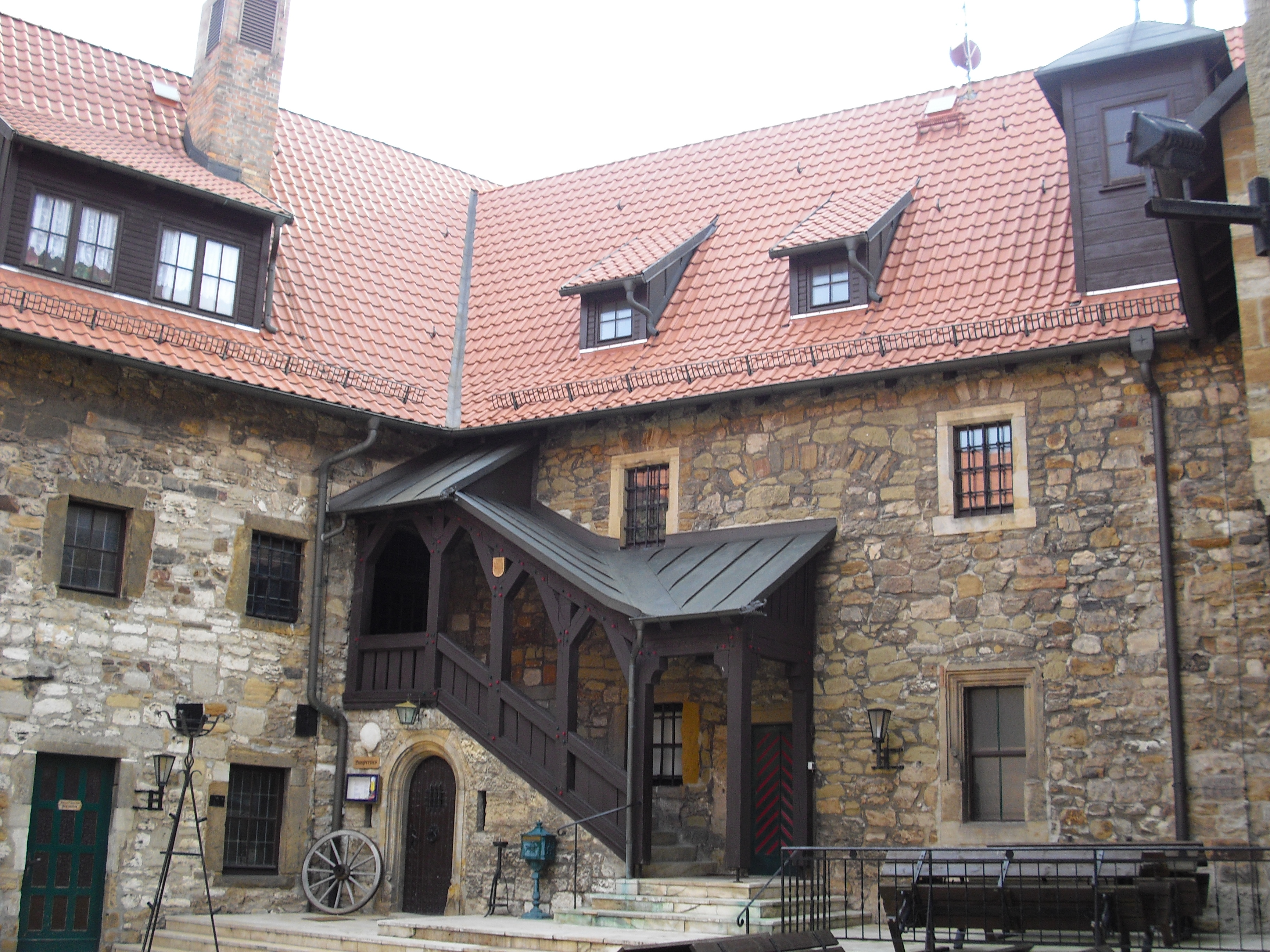 Wachsenburg Restaurant